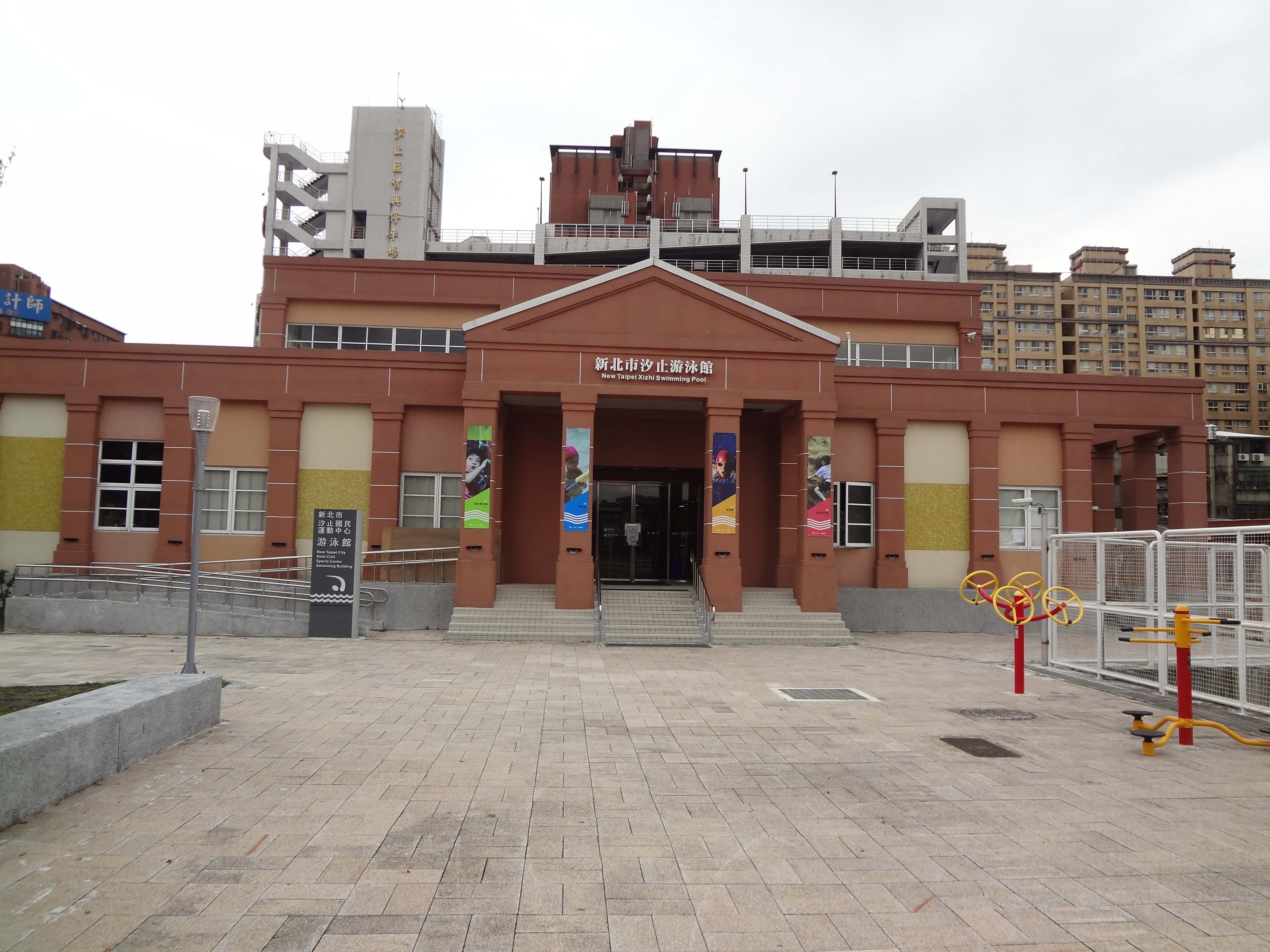 新北市汐止國民運動中心游泳館，原新北市汐止游泳館，位於新北市汐止區綜合運動場內。